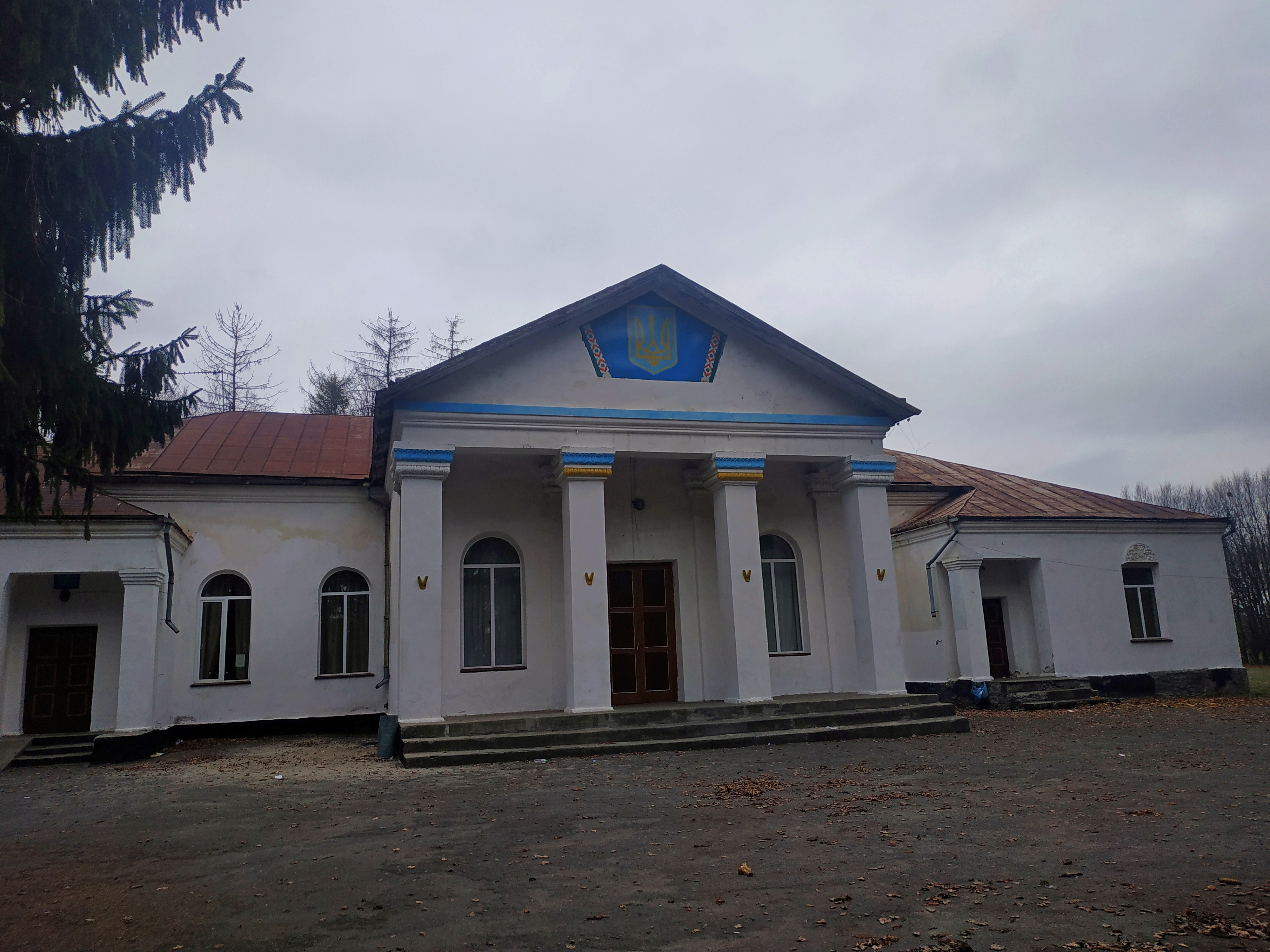 Будинок культури